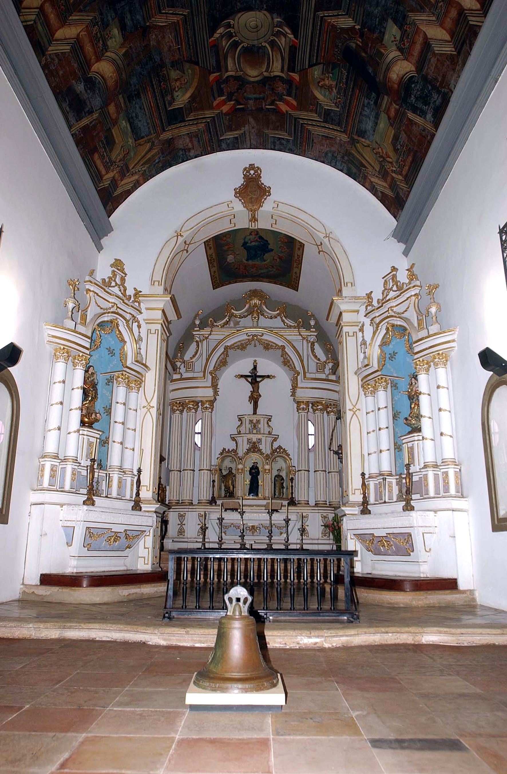 São Cristóvão, SE - Detalhes do Convento da Santa Cruz, no muncípio de São Cristóvão, antiga capital de Sergipe. Foto: Wilson Dias/ABr